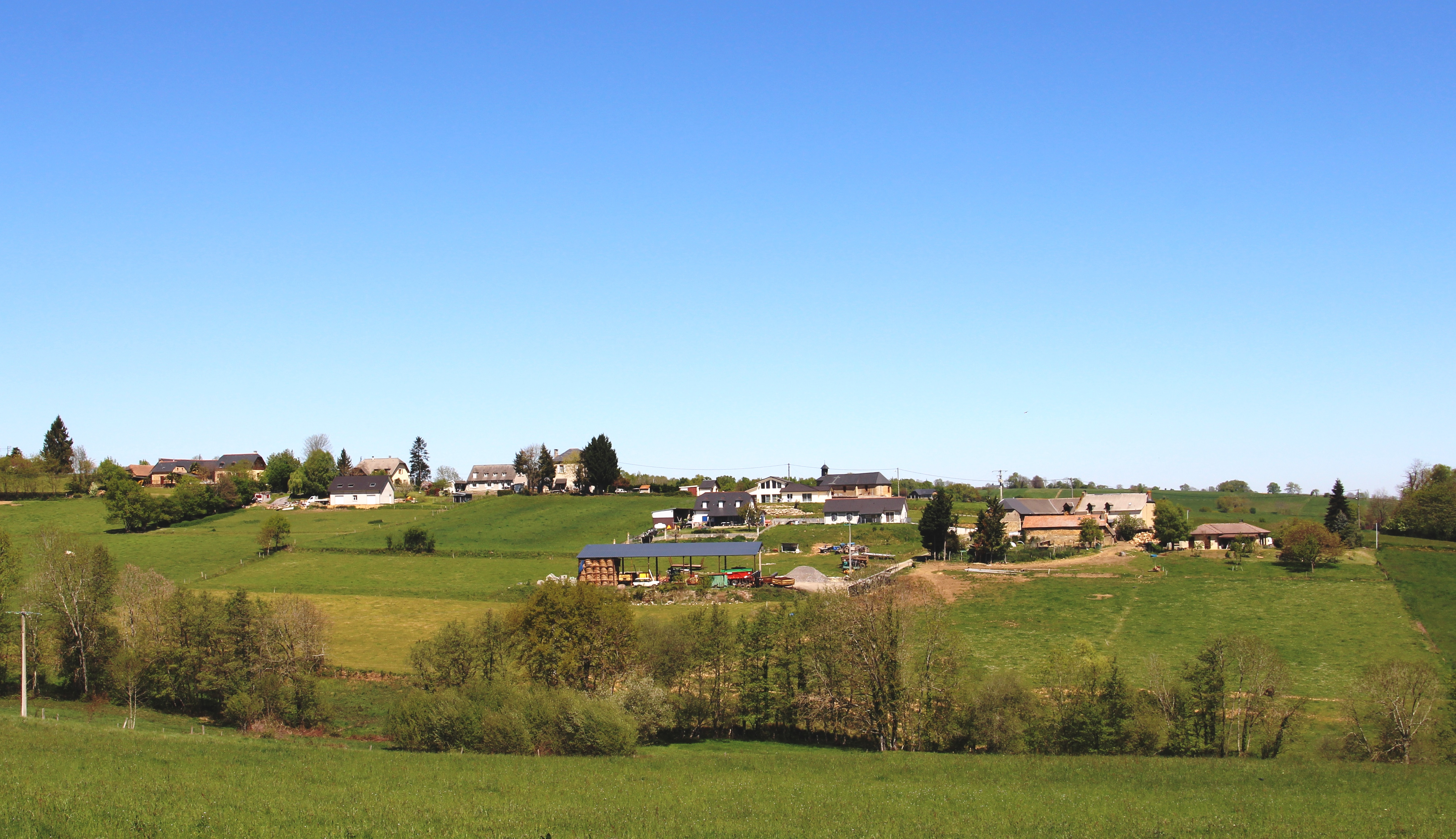 Bernac-Dessus (Hautes-Pyrénées)